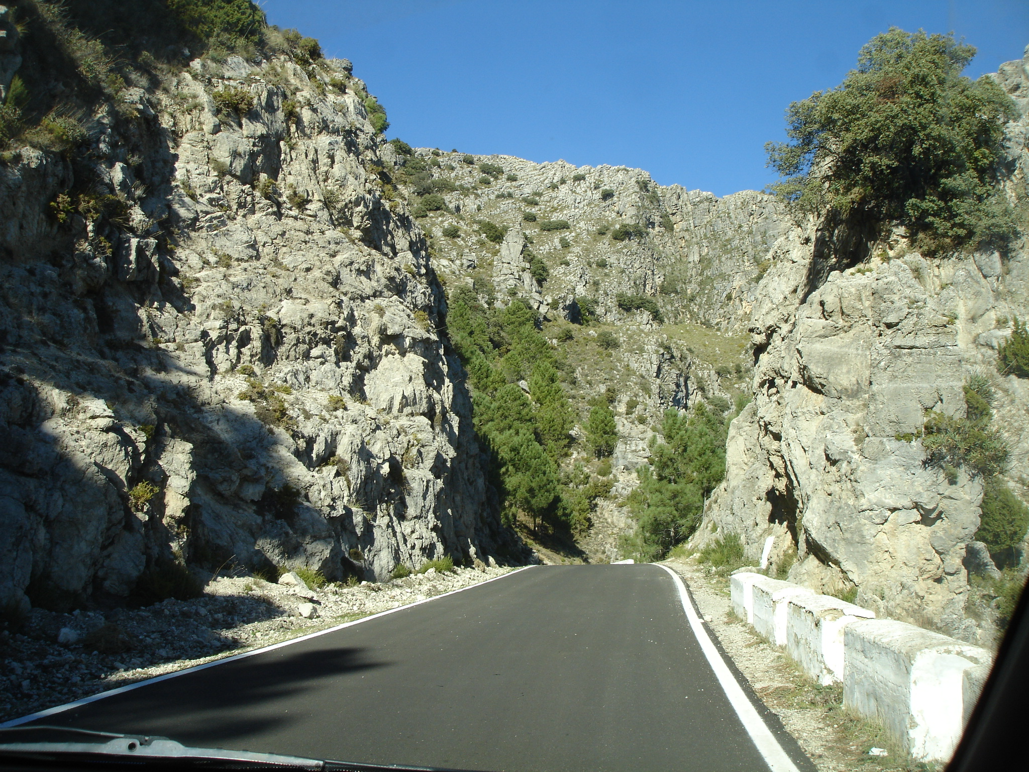 Carreta de Grazalema al Puerto de las Palomas